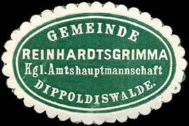 Siegelmarke Gemeinde Reinhardtsgrimma